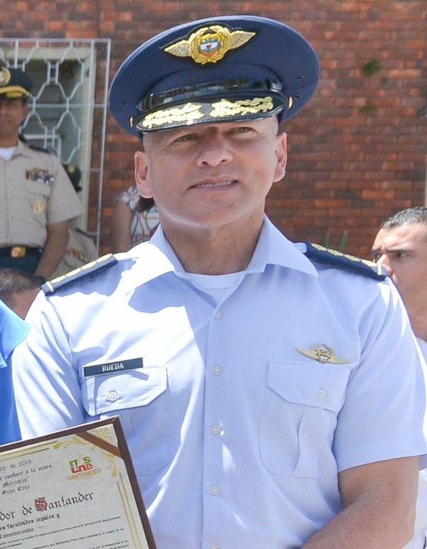 General Ramsés Rueda en Charalá Santander, en la conmemoración batalla de pienta, bicentenario.